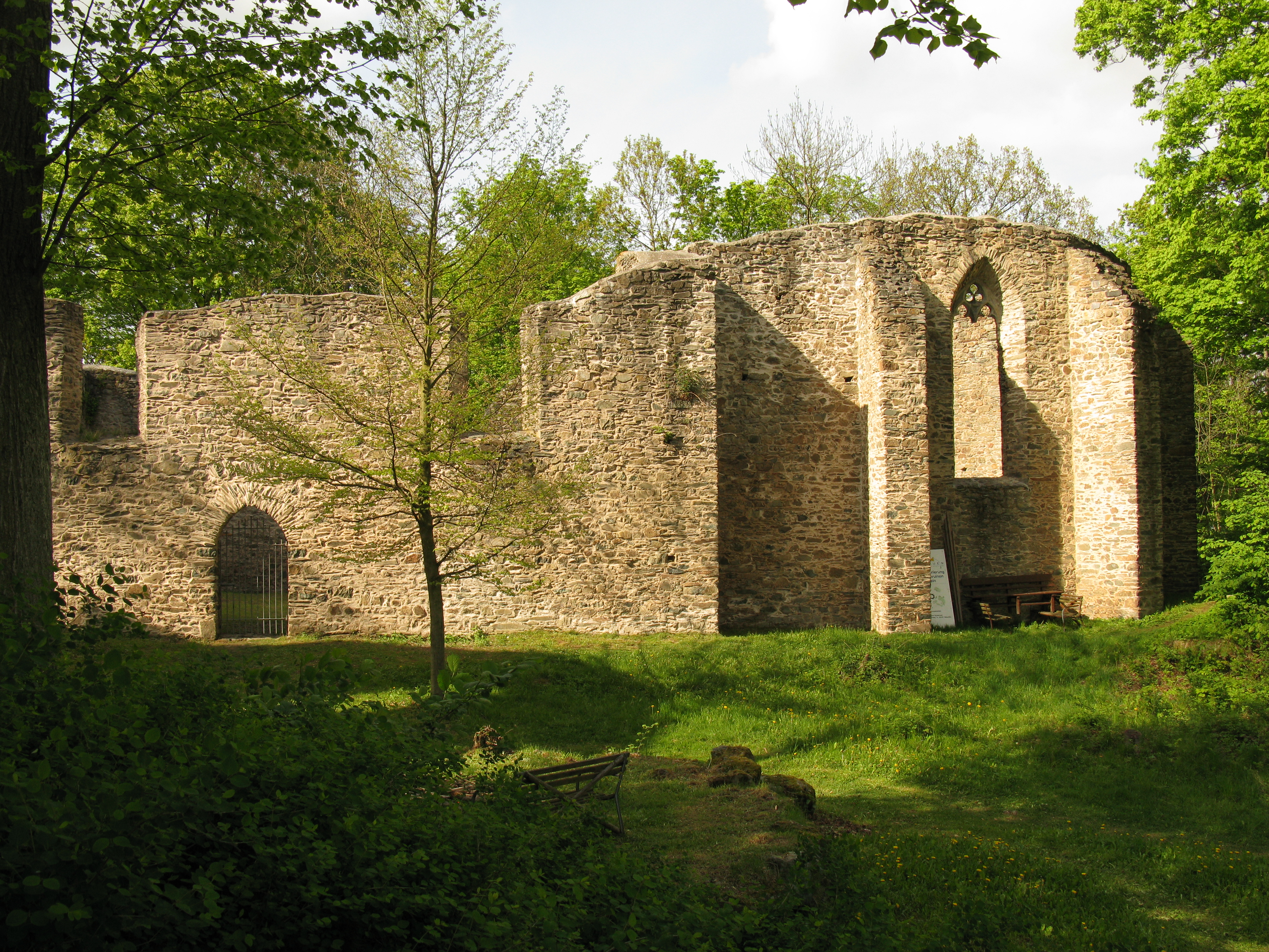 Ruine der unteren Burgstein-Kirche von Süden (Gemeinde Weischlitz)